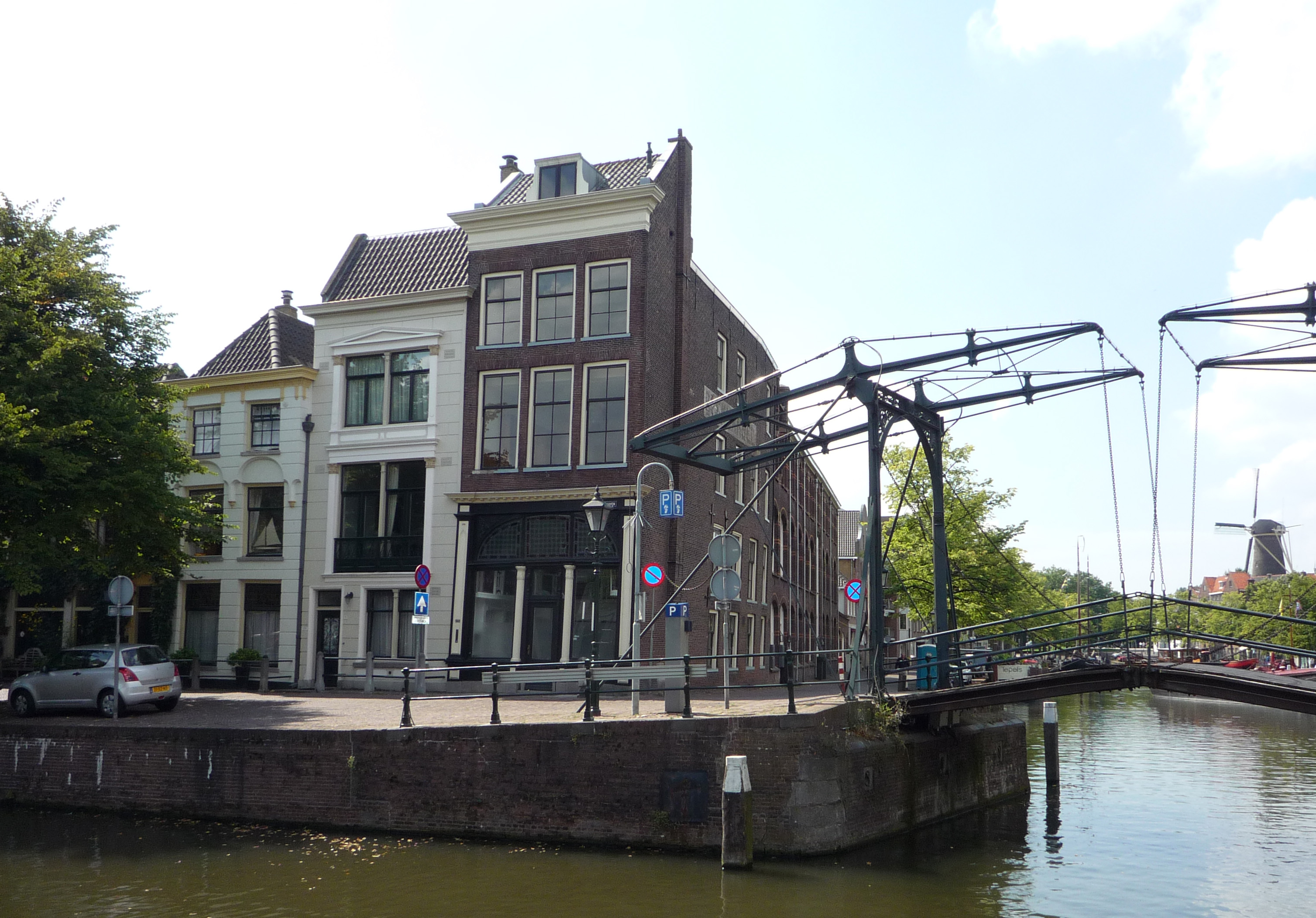 Nummer 141 is het hoekpand. Op deze foto zie je het pand in een wat ruimere context zodat je een indruk krijgt van de locatie.